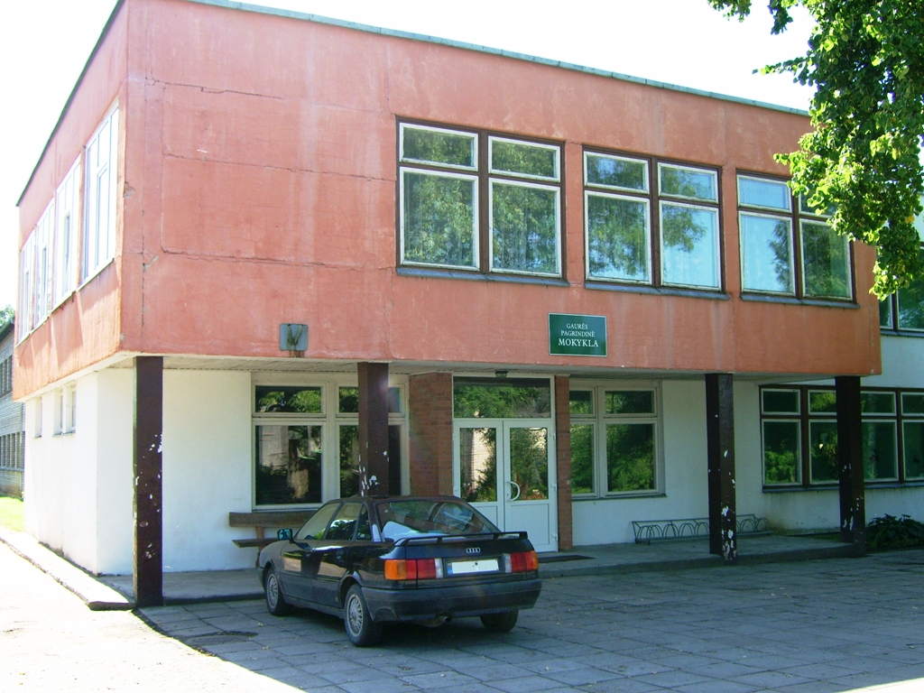 Tauragės rajono Gaurės pagrindinė mokykla